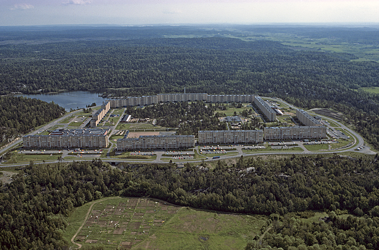 Rannebergen bostadsområde byggt 1974. Motiv: Rannebergen Nyckelord: Flygbilder Kategori: Bostadsområde Rannebergen bostadsområde byggt 1974.